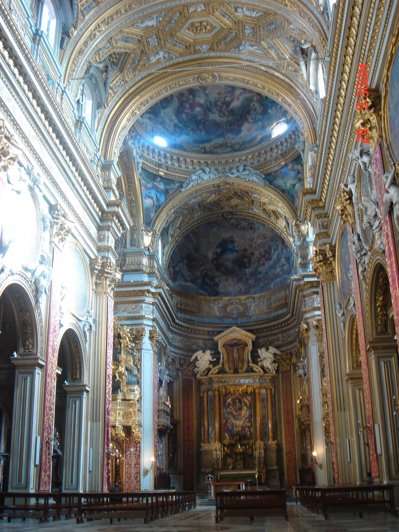 Roma , santa Maria in Vallicella (detta anche "Chiesa nuova"): interno